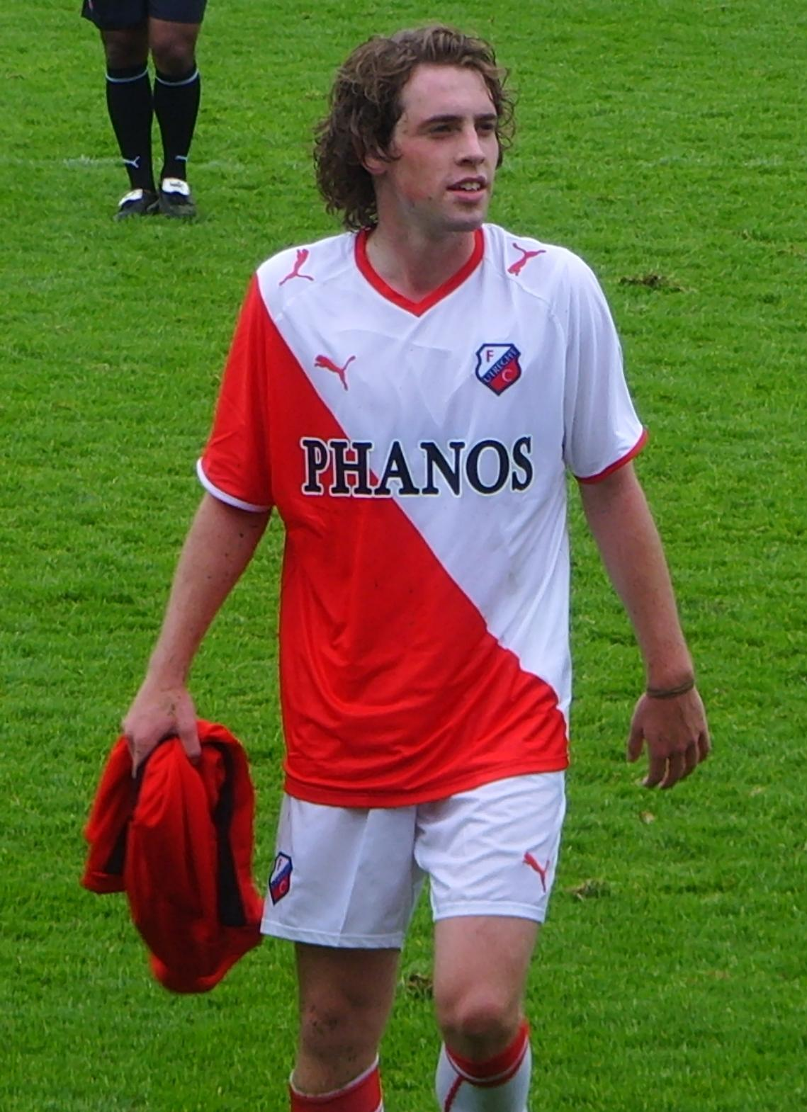 Barry Maguire na de eerste training van het seizoen 2008-2009 van FC Utrecht